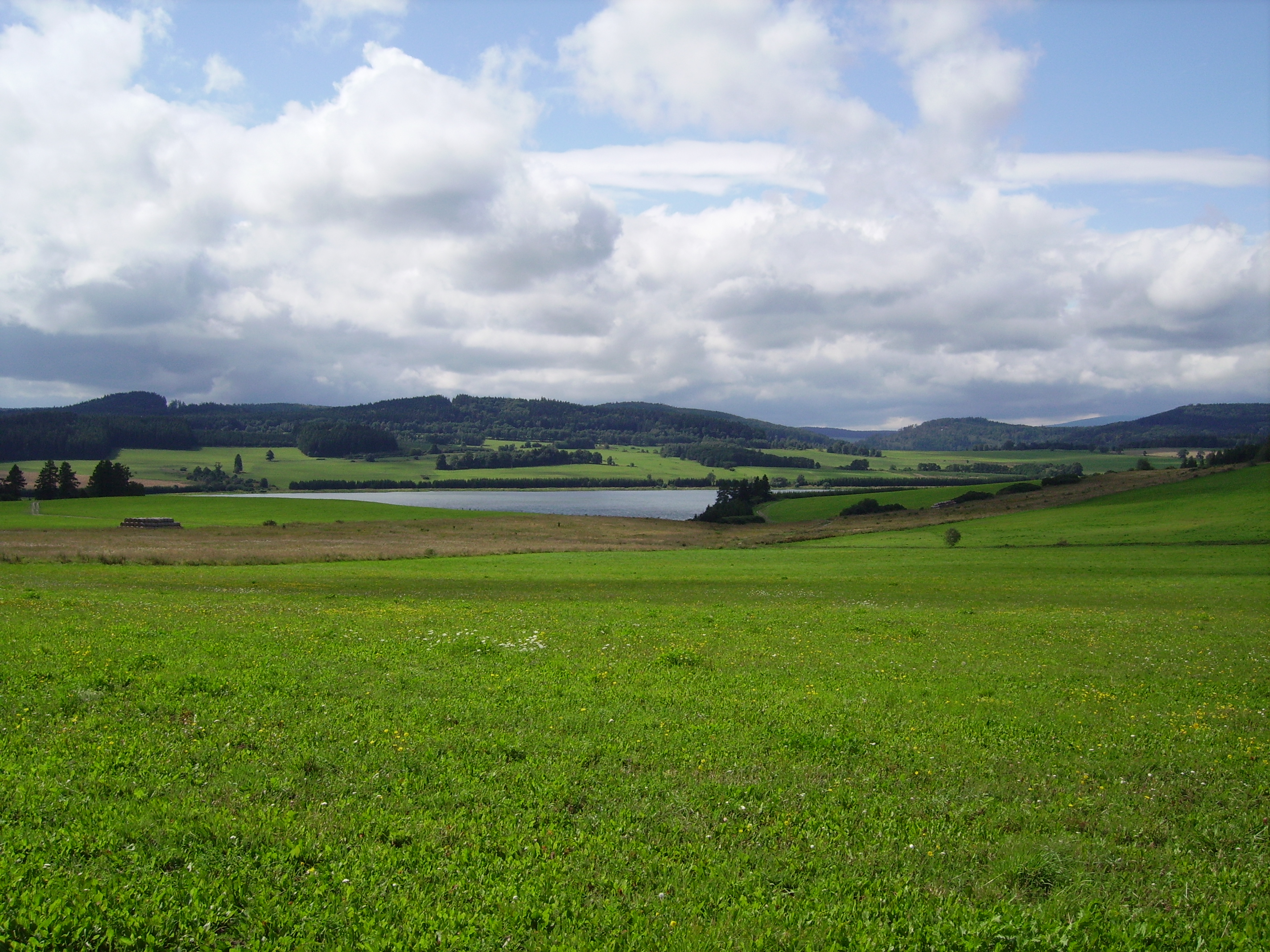 Slezská Harta v Razové poblíž Razovských tufitů